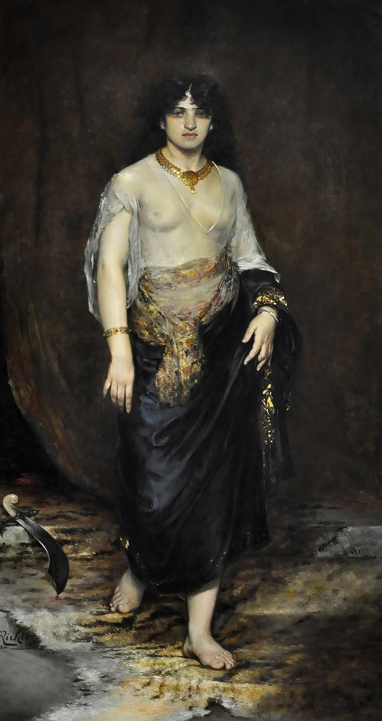 Edouard Frederic Wilhelm Richter (1844-1913) Judith (1877) MSK Gent